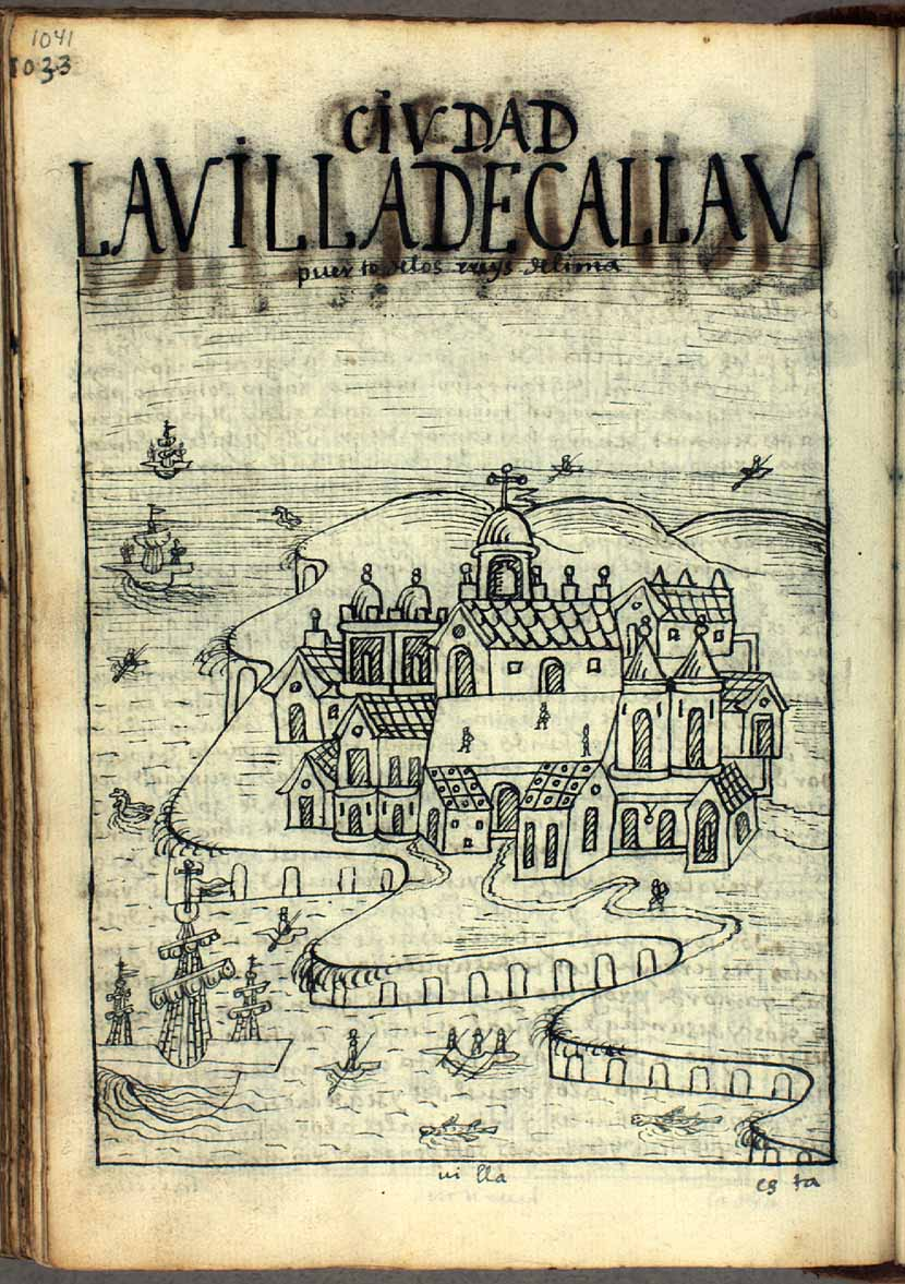 1033 [1041] LA VILLA DE CALLAV, puerto de los Reys de Lima / uilla / CIVDAD